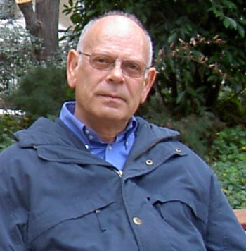 פרופ' עוזי אבן Prof. uzi Even